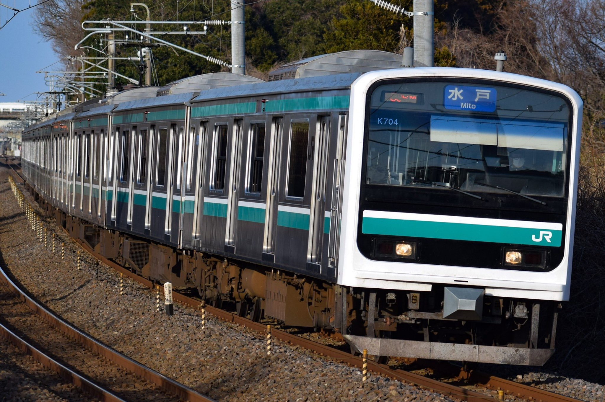 JR東日本 E501系水カツK704編成 常磐線東海〜佐和